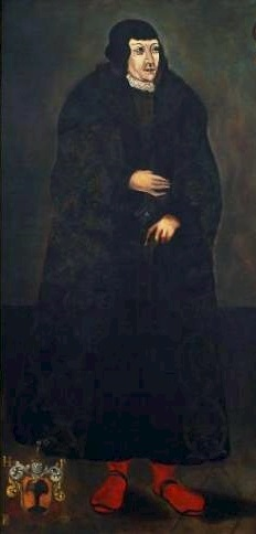 Stanisław Mazowiecki